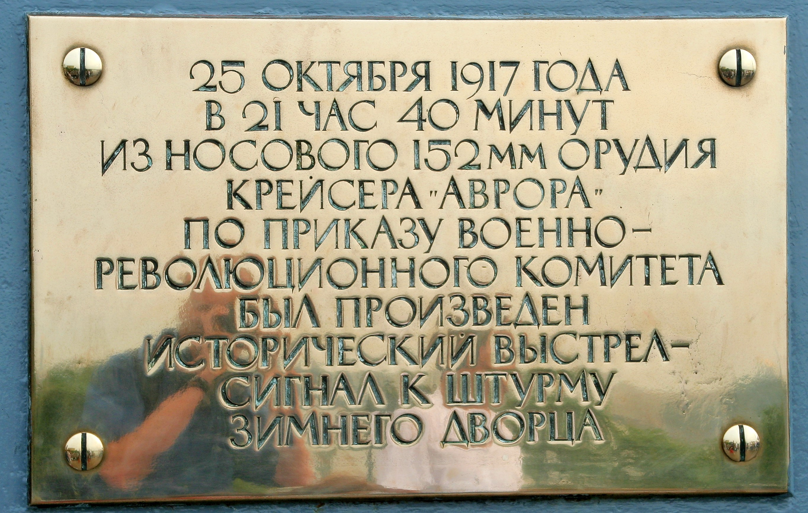 Gedenktafel am Buggeschütz des Panzerkreuzers Aurora